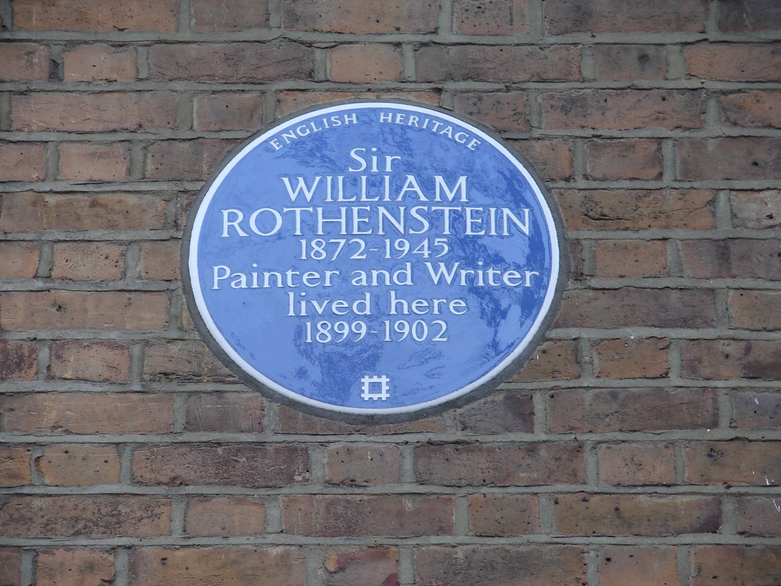 Sir William Rothenstein